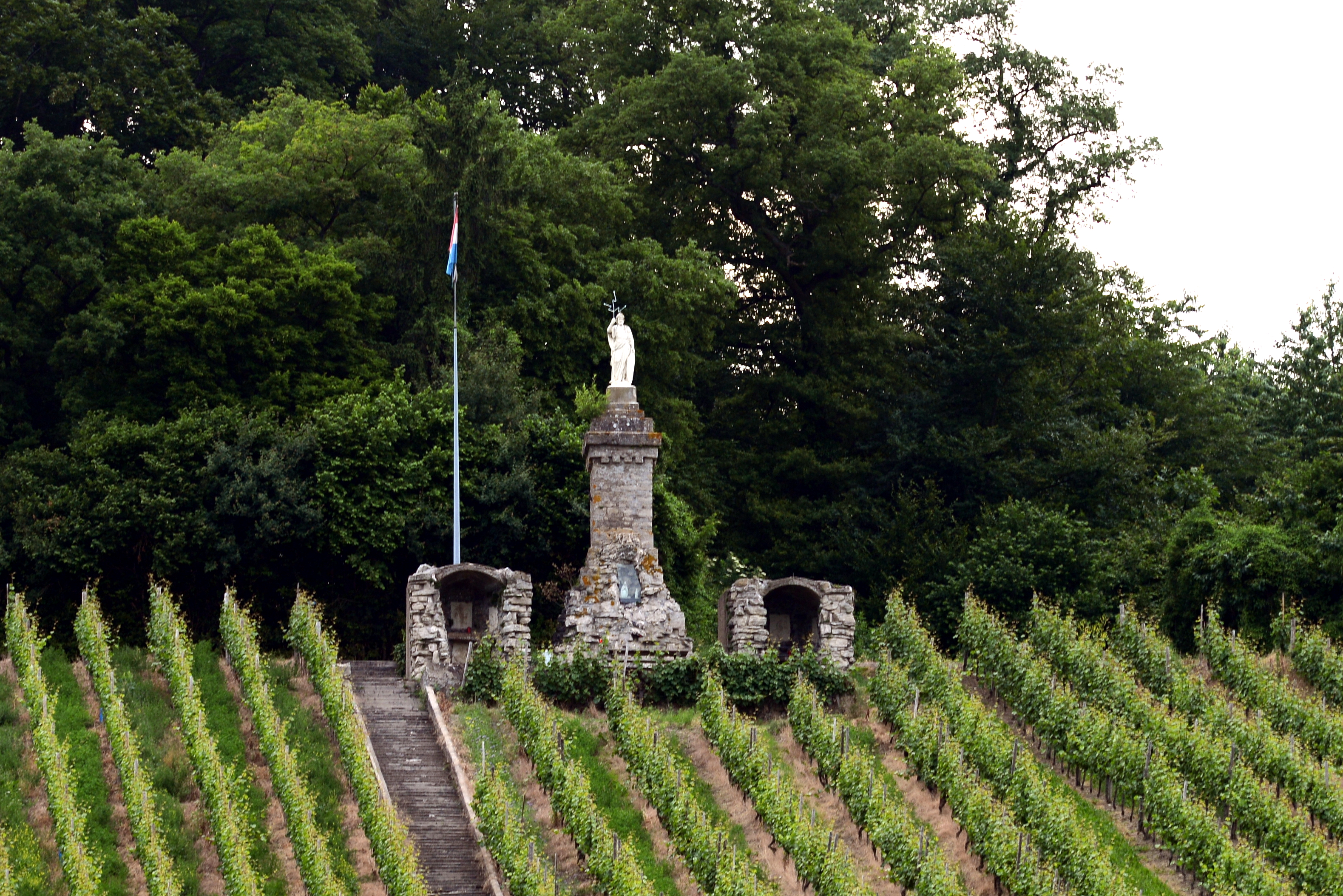 Veréierung vum Hellegen Donatus um Felsbierg zu Wëntreng. D'Statu gouf ufanks vum 20. Joerhonnert vun den Awunner erriicht a soll d'Wéngerten virun Donnerwiederen a Knëppelsteng schützen.